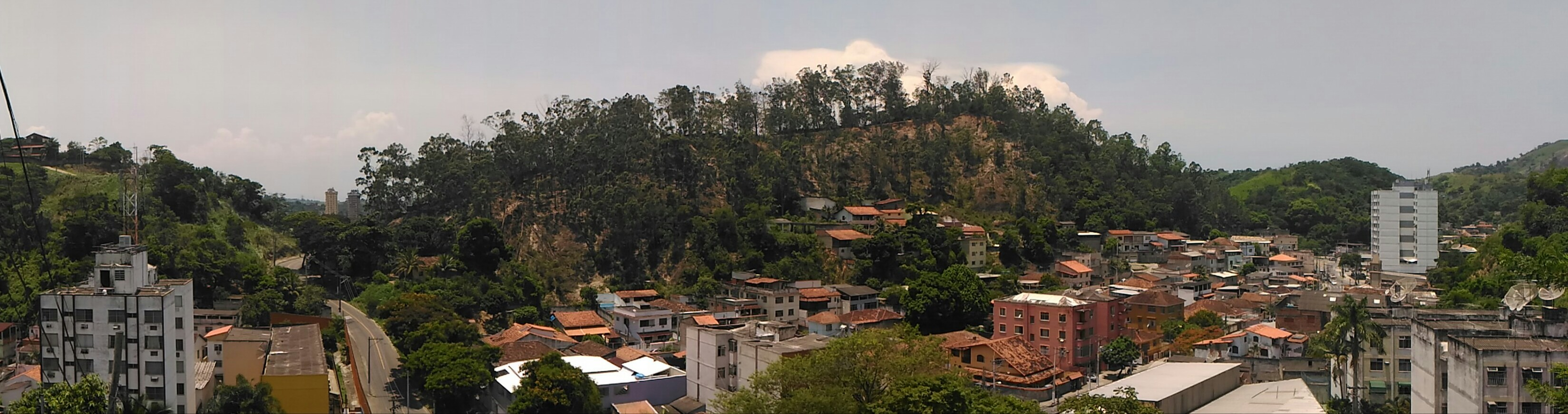 Visão do alto do morro do abacaxi entrando pela travessa Jonathas Botelho, imagem panorâmica visualizando a maior parte do bairro.